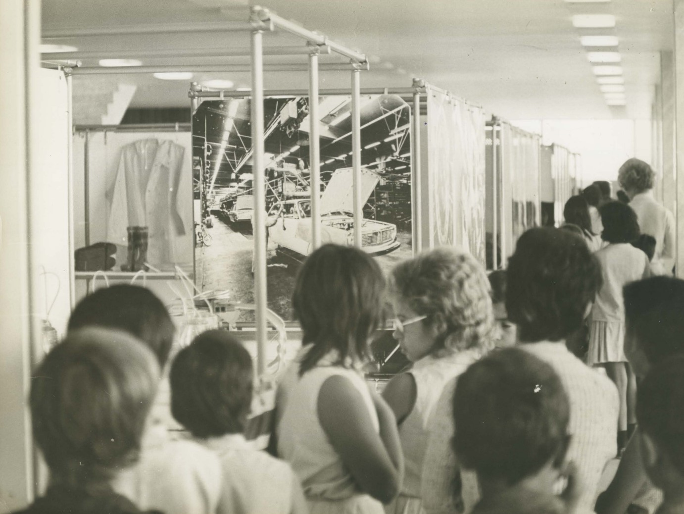 Fotografia do Fundo Correio da Manhã, sob a guarda do Arquivo Nacional.